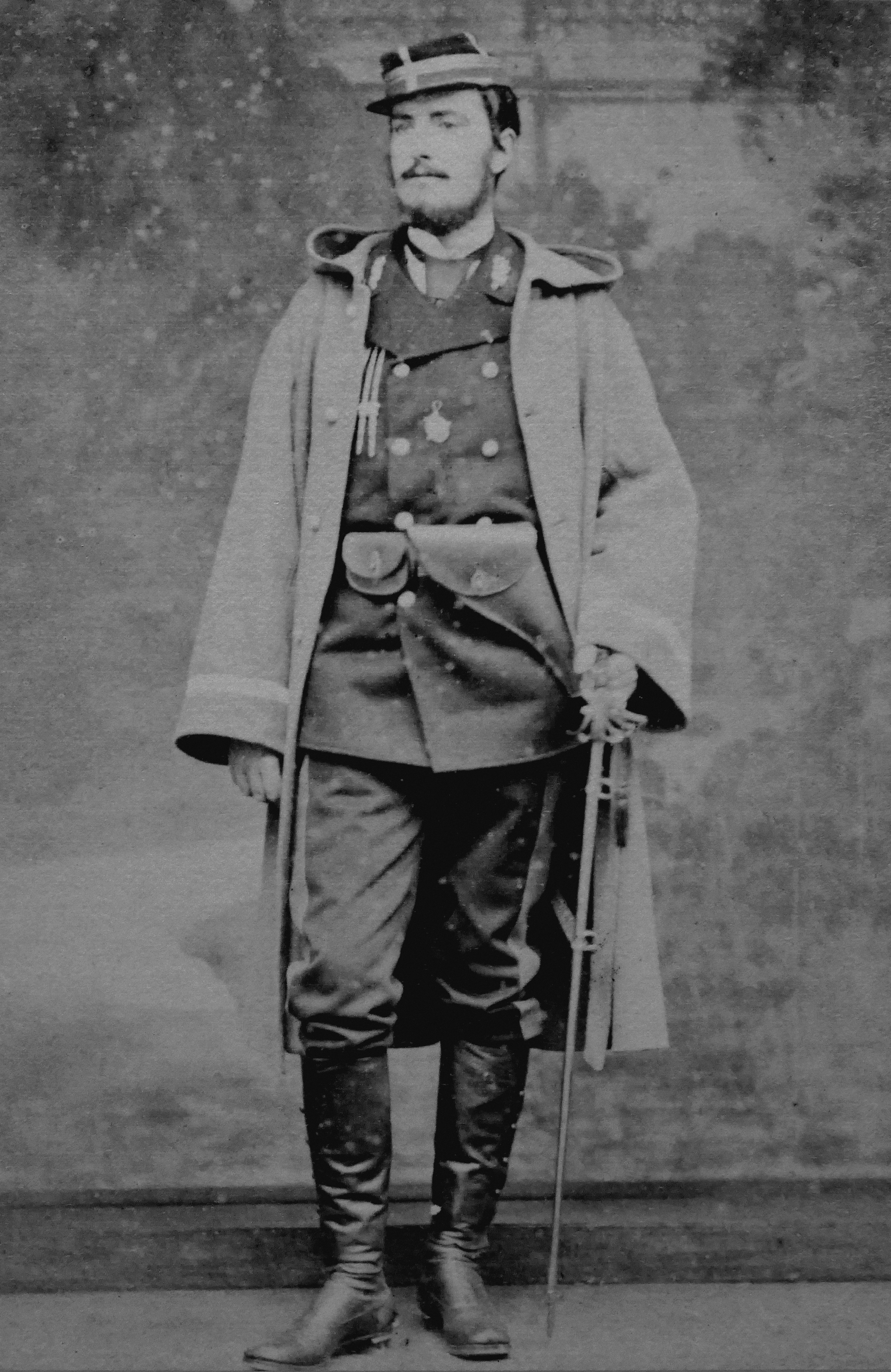 Alphonse de Neuville en garde national, vers 1870, photographe inconnu. Musée de l'Armée . Exposition France-Allemagnes(s), 1870-1871, La guerre, la Commune, les mémoires. 13 avril-30 juillet 2017.